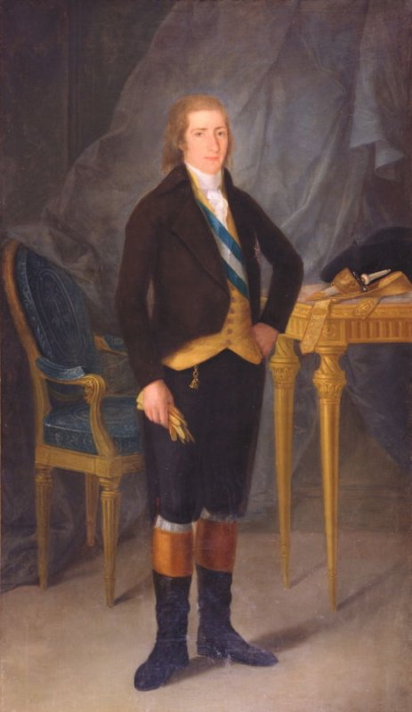 Retrato del conde de Castro-Terreño (Prudencio Guadalfajara y Aguilera, 1761-1855)